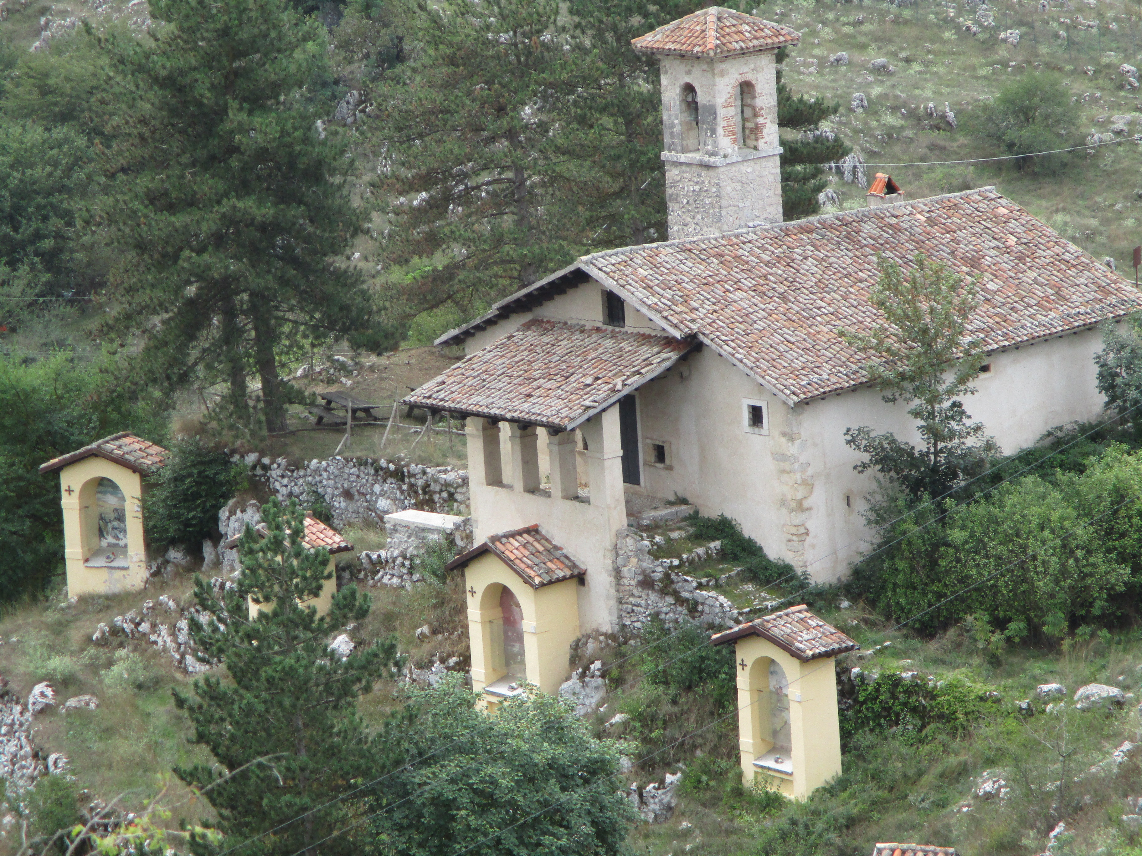 La chiesa del Calvario e la via Crucis